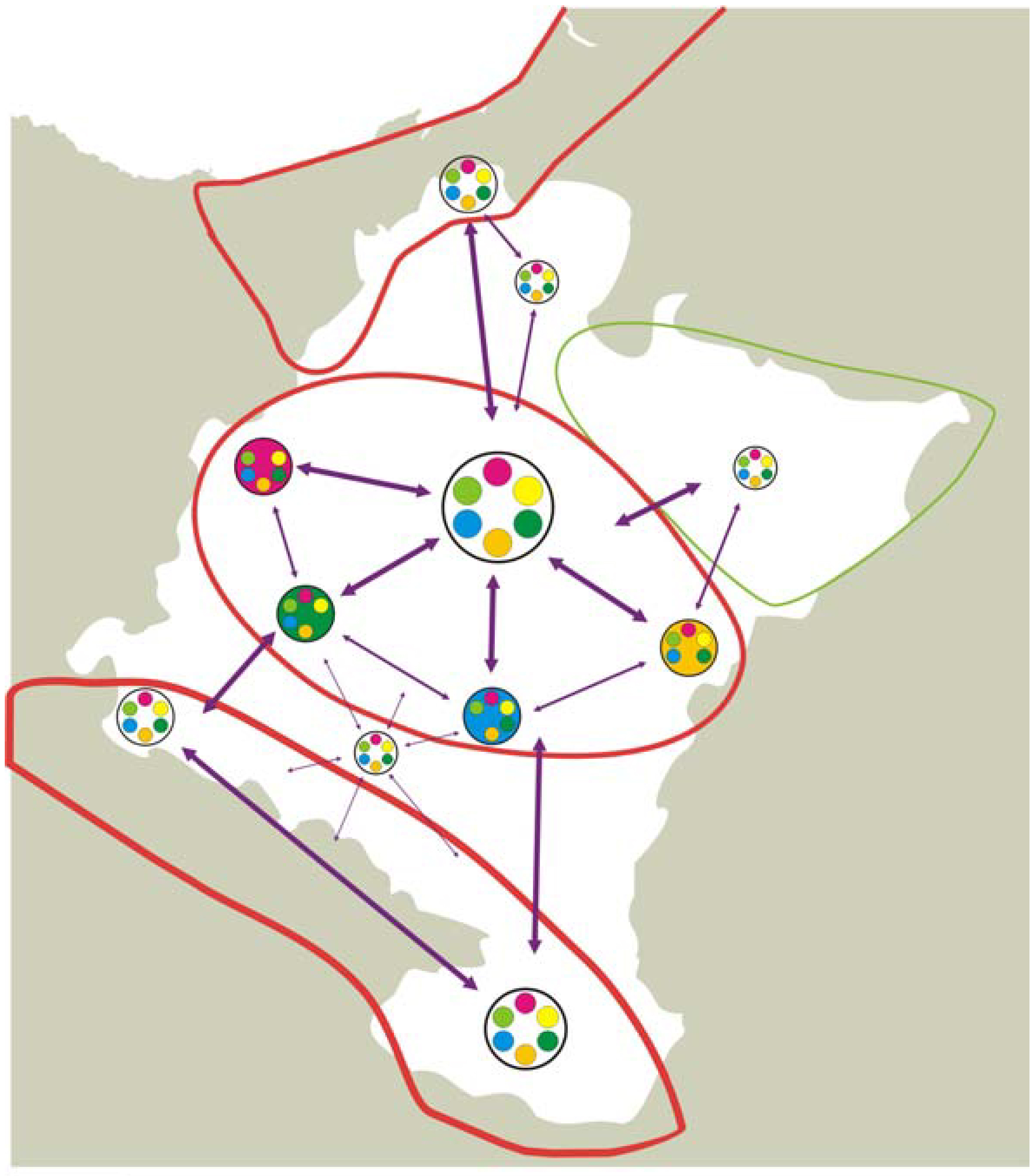 Nafarroako Lurralde Estrategian agertzen den "Etorkizuneko funtzionalitate zentrala".